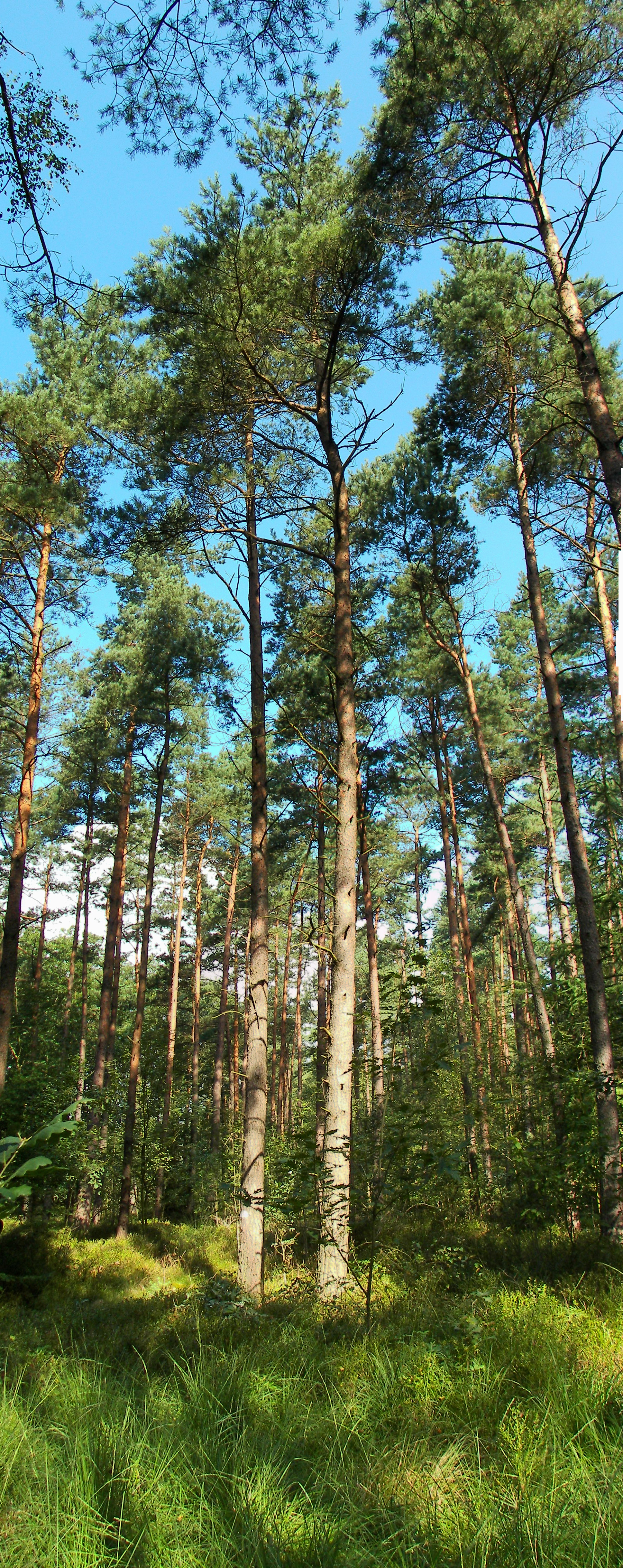 Fichtenforst in der Lüneburger Heide bei Schneverdingen ("Spitzbubenweg")